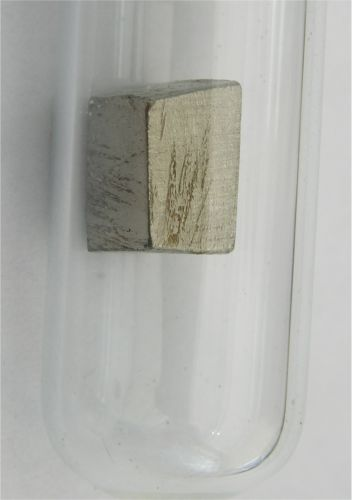 praseodymium Bildbeschreibung: Praseodym unter Argongas Quelle: Foto aus meiner Elementesammlung Fotograf: Tomihahndorf Datum: März 2006